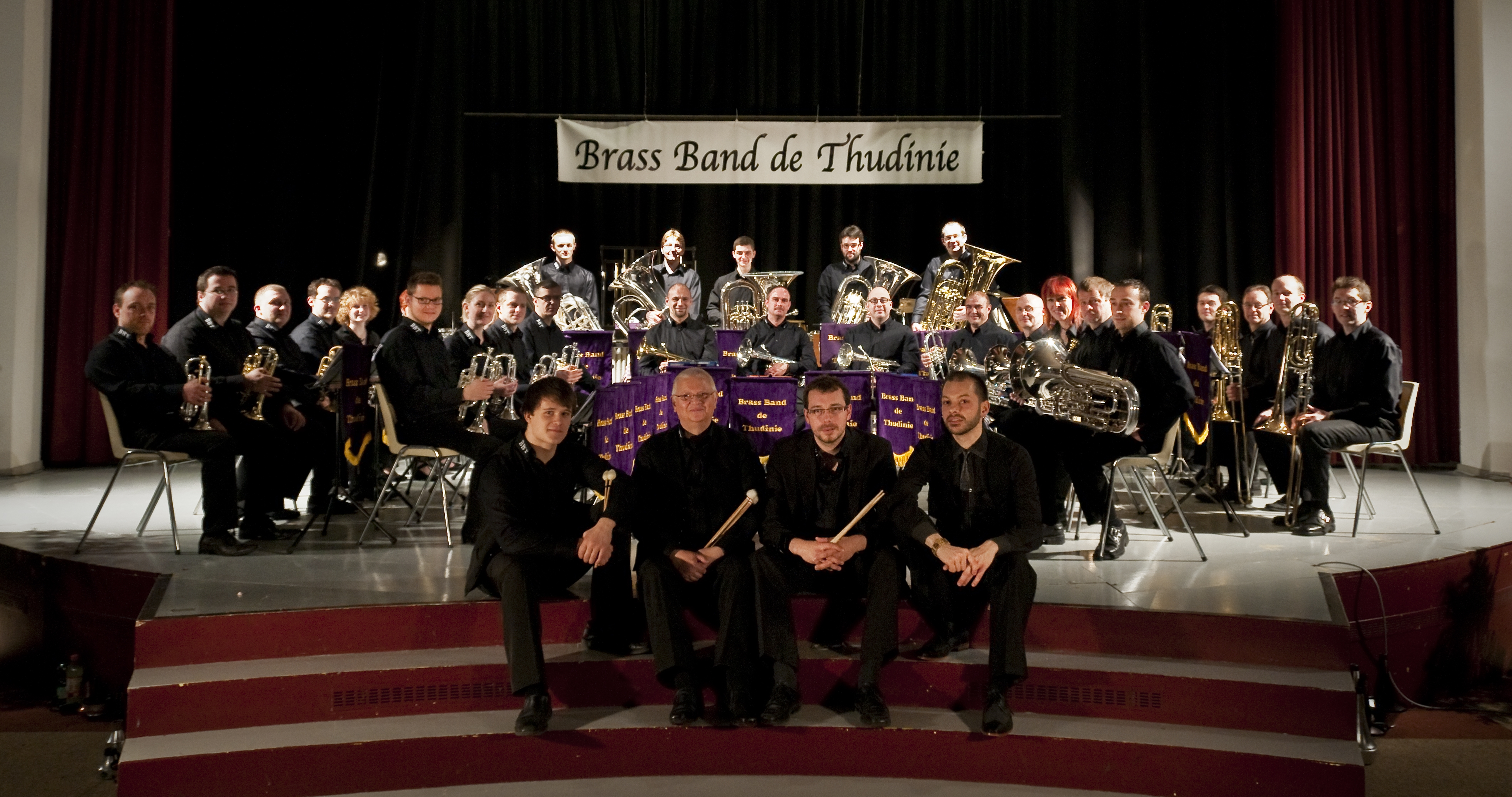 L'orchestre du BBT